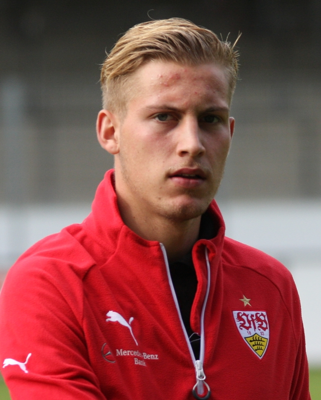 Mart Ristl nach dem Spiel gegen Bremen II. Bild von